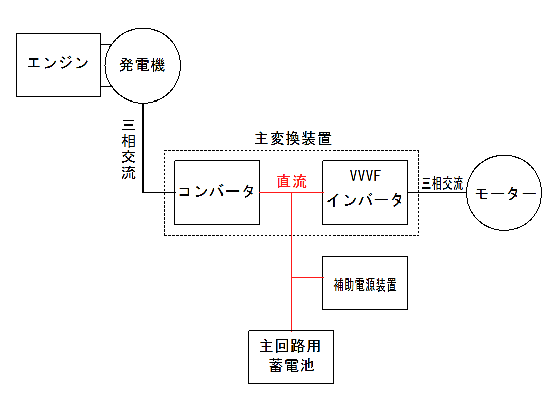 HB--E210系ハイブリット気動車の主回路の見取り図